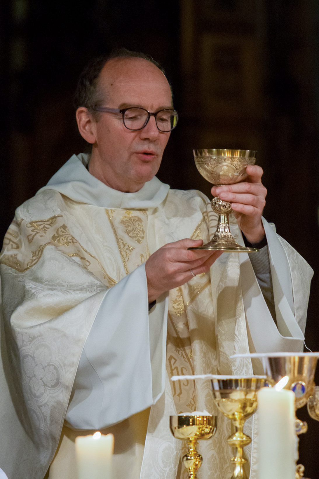 Le Père Philippe Christory célèbre l'eucharistie du Jeudi Saint 2014